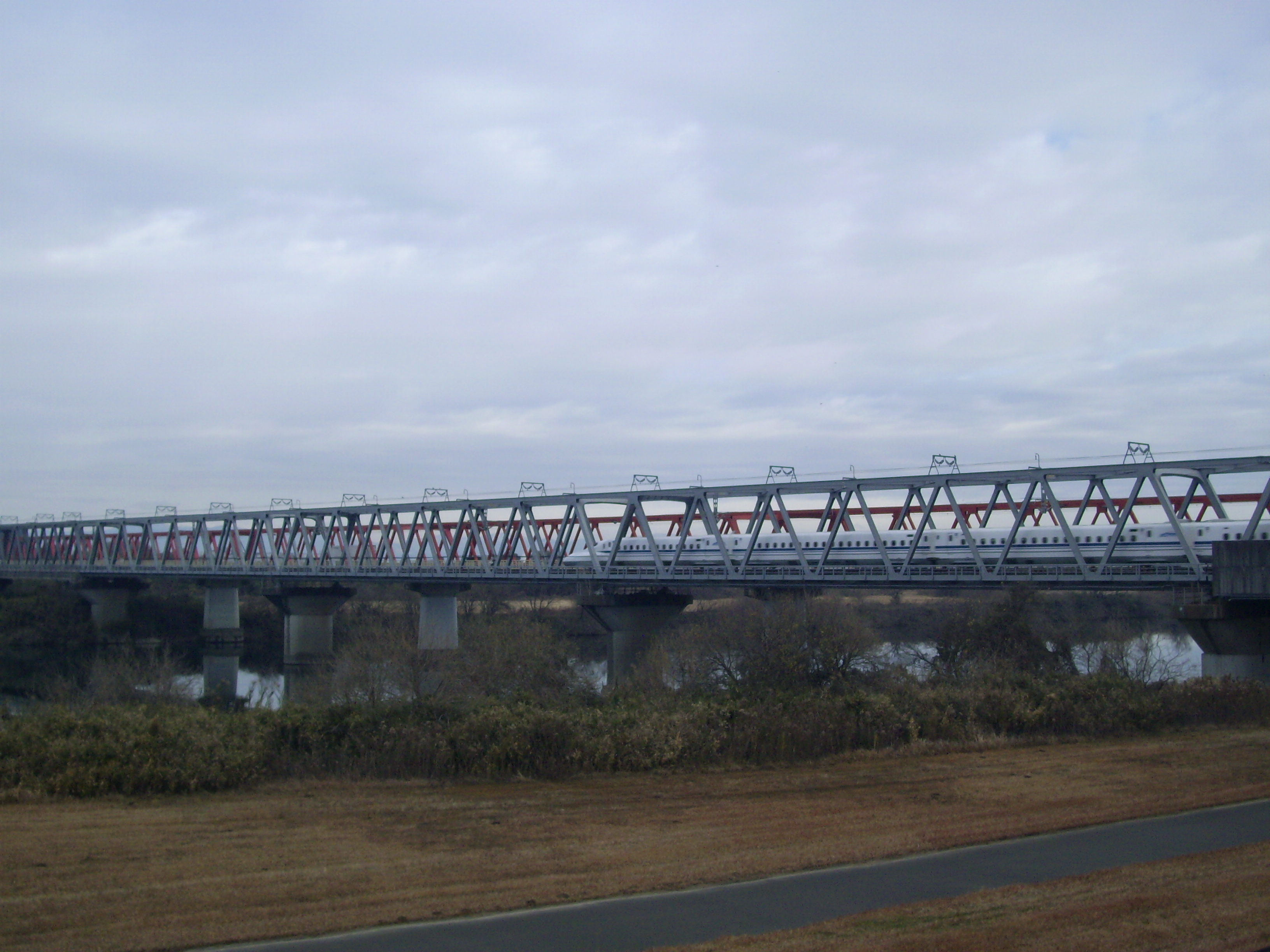 東海道新幹線長良川橋梁 ㊟カメラを起動すると日付機能が出荷時のものに初期化されるため、ファイル履歴の撮影日時とメタデータの原画像データの生成日時が異なります。